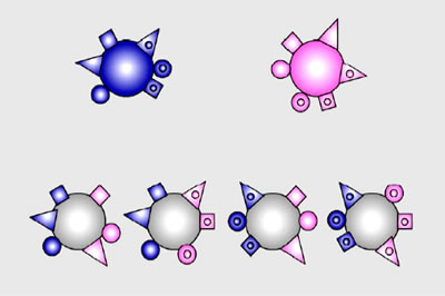 Infografía sobre el sistema HLA, se ilustra la forma en que los hijos heredan la mitad de haplotipos de cada progenitor. Author: Fernando da Rosa